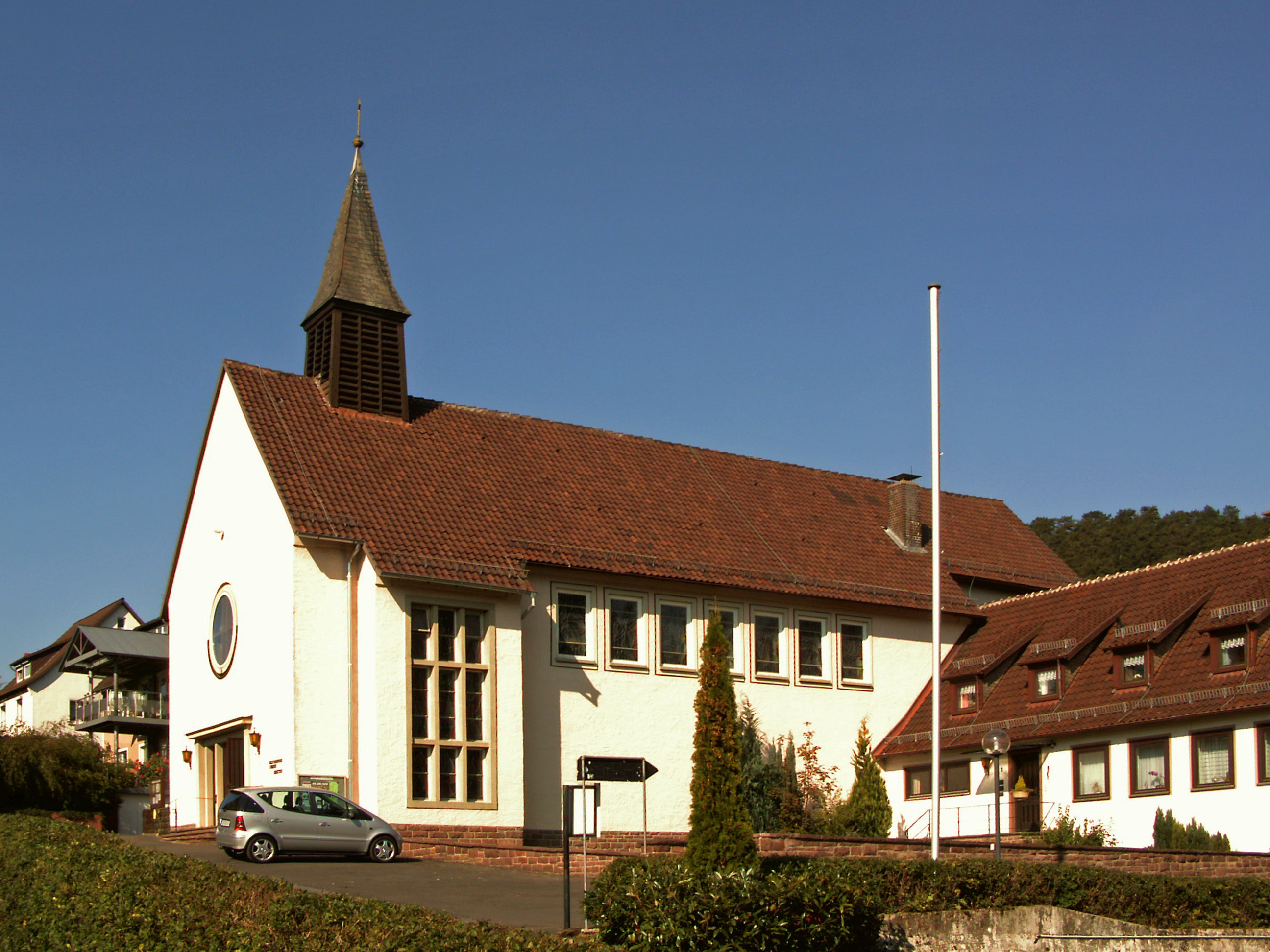 Katholische Kirche St. Marien in Hardegsen, Landkreis Northeim